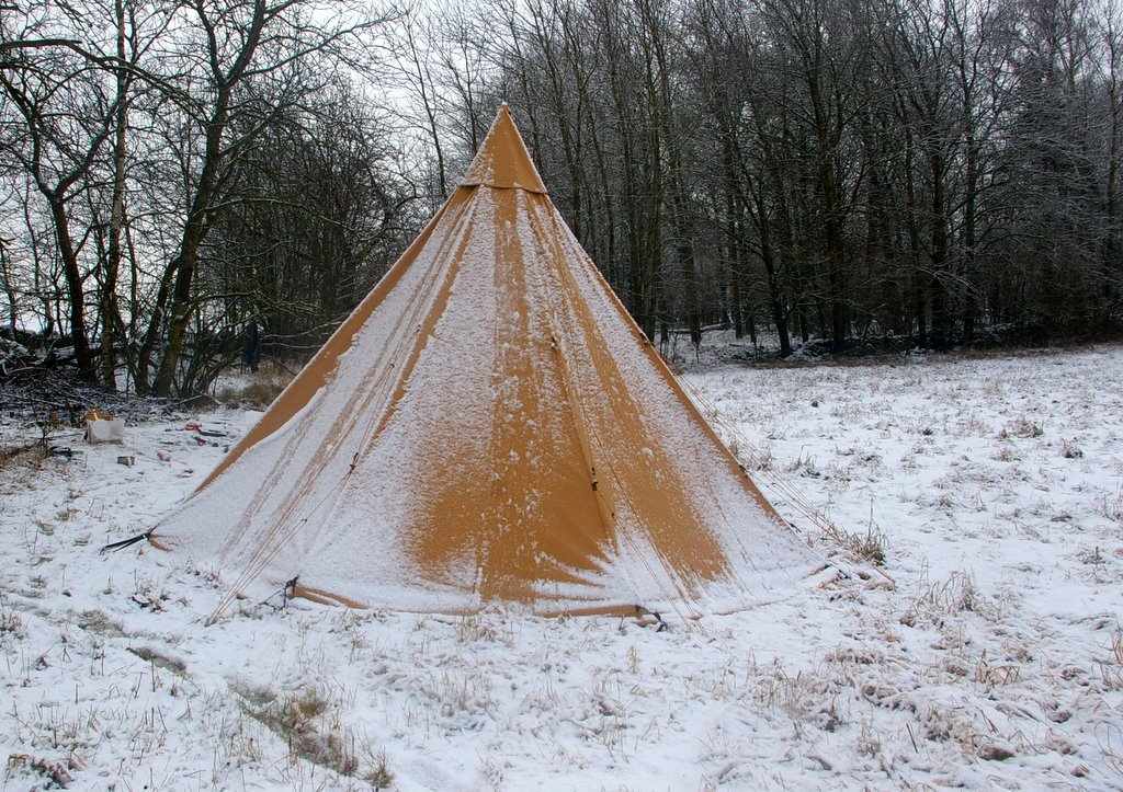 Tältkåta